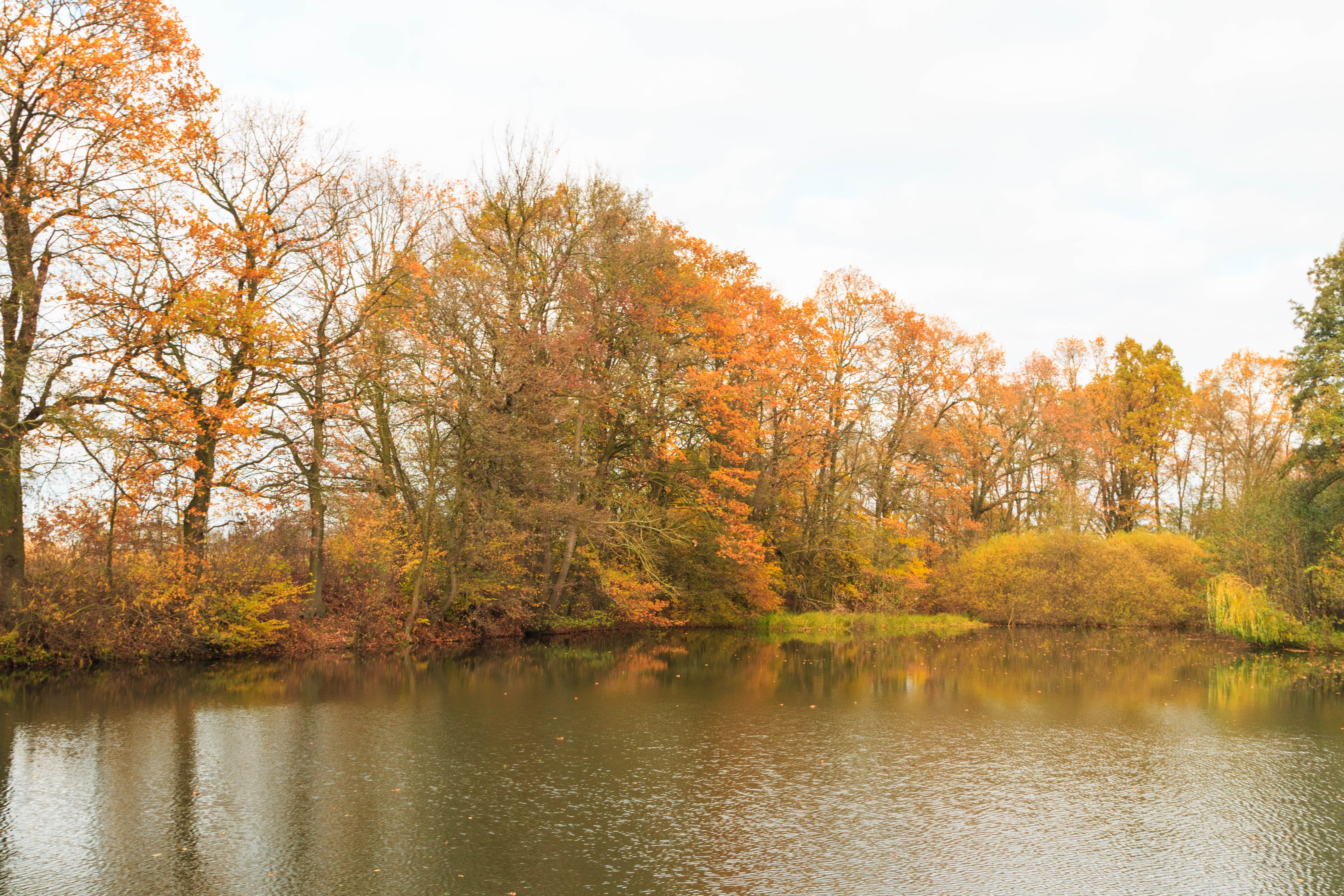 Lohenické jezero Project: Vodstvo.